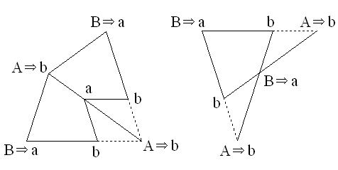 Découpe des cerf-volants et des fléchettes pour pavage de Penrose. Image personnelle.